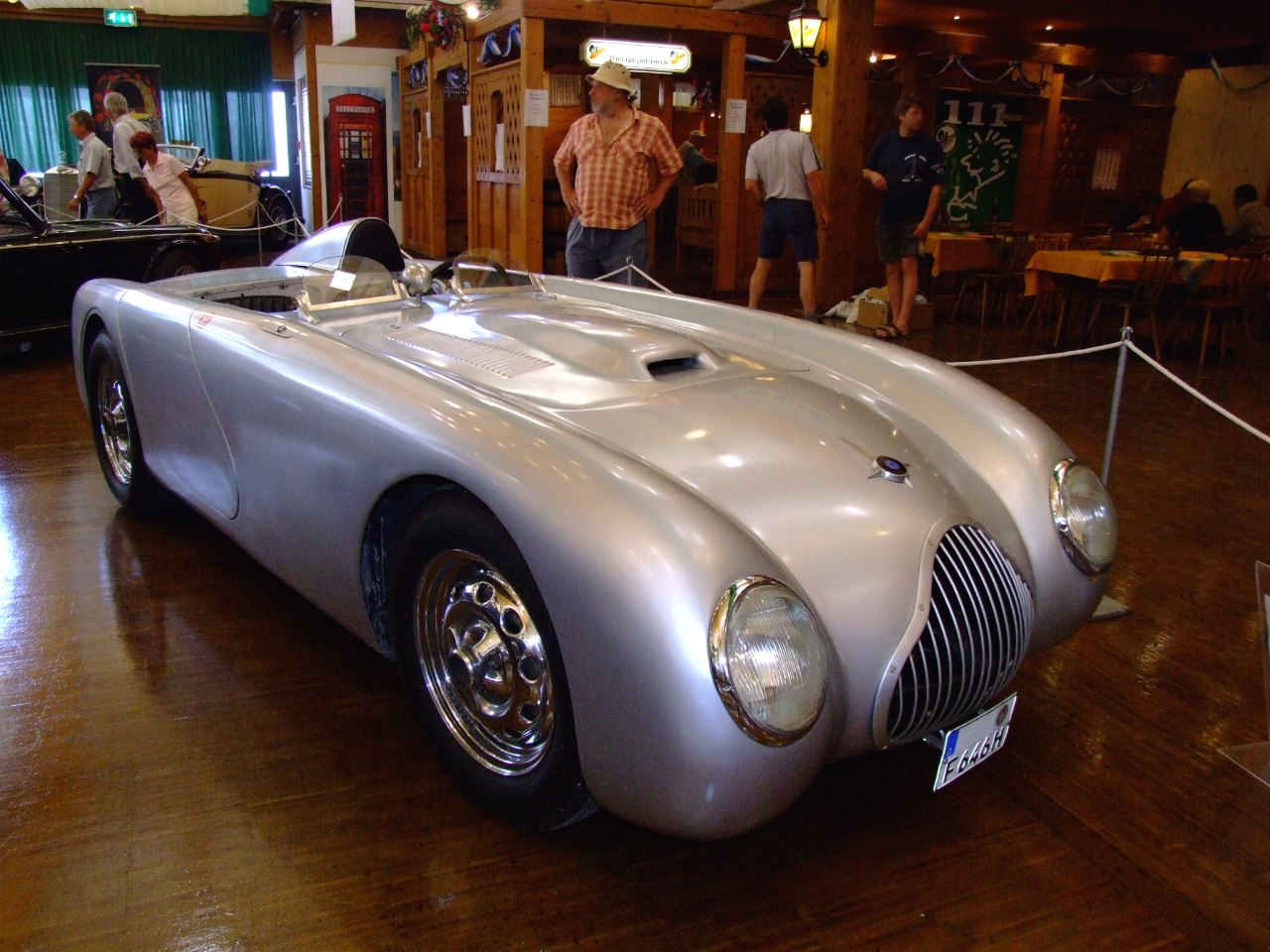 Veritas RS 2000 ccm 135 PS 1948